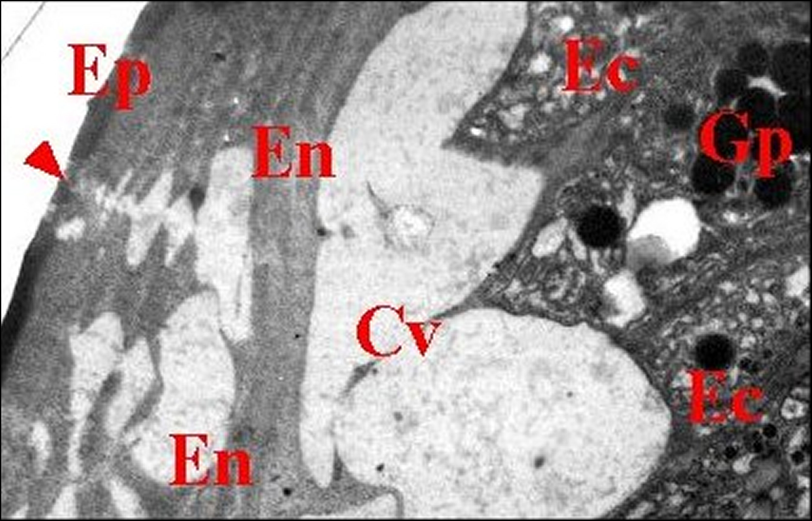 Argyrodes argyrodes : cuticule et épithélium du couloir de la glande rostrale. Microscopie électronique à transmission